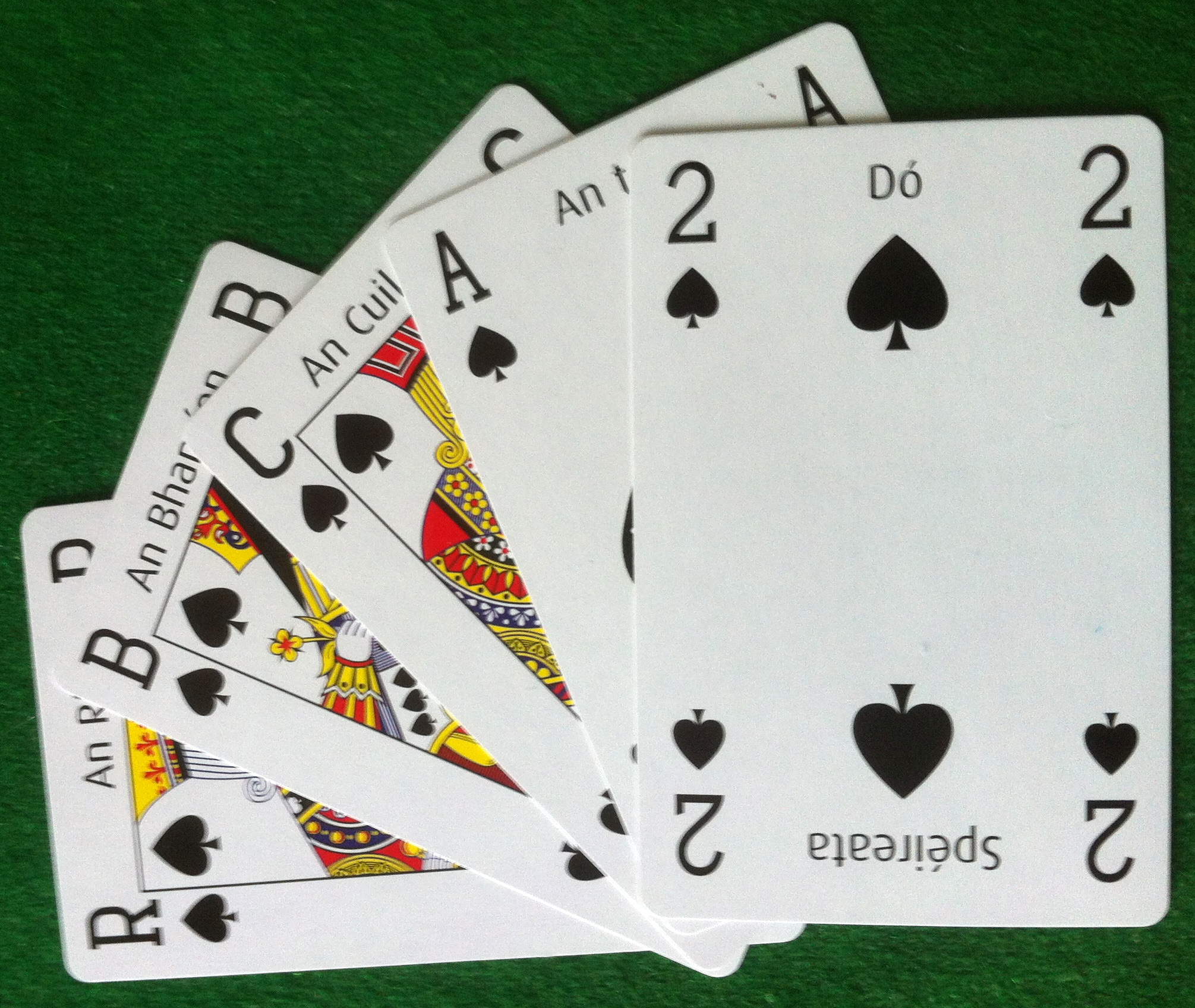 Na cártaí spéireata is fearr sa chluiche chúig fichead agus spéireata ina dhrámh.